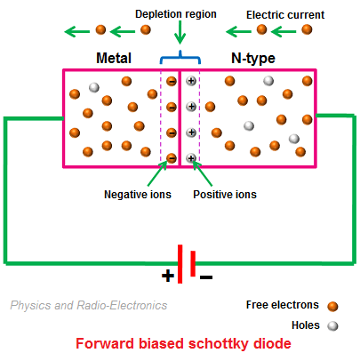 Schottky dioodi tööpõhimõte